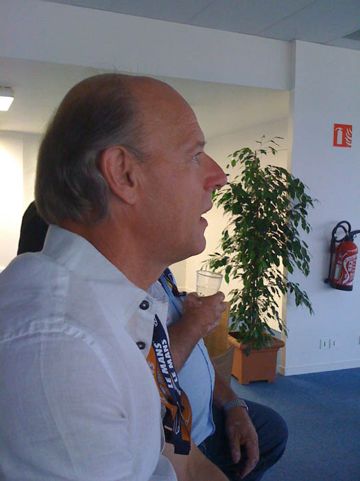 Sylvain Boulay aux drivers' club - Le Mans 2011